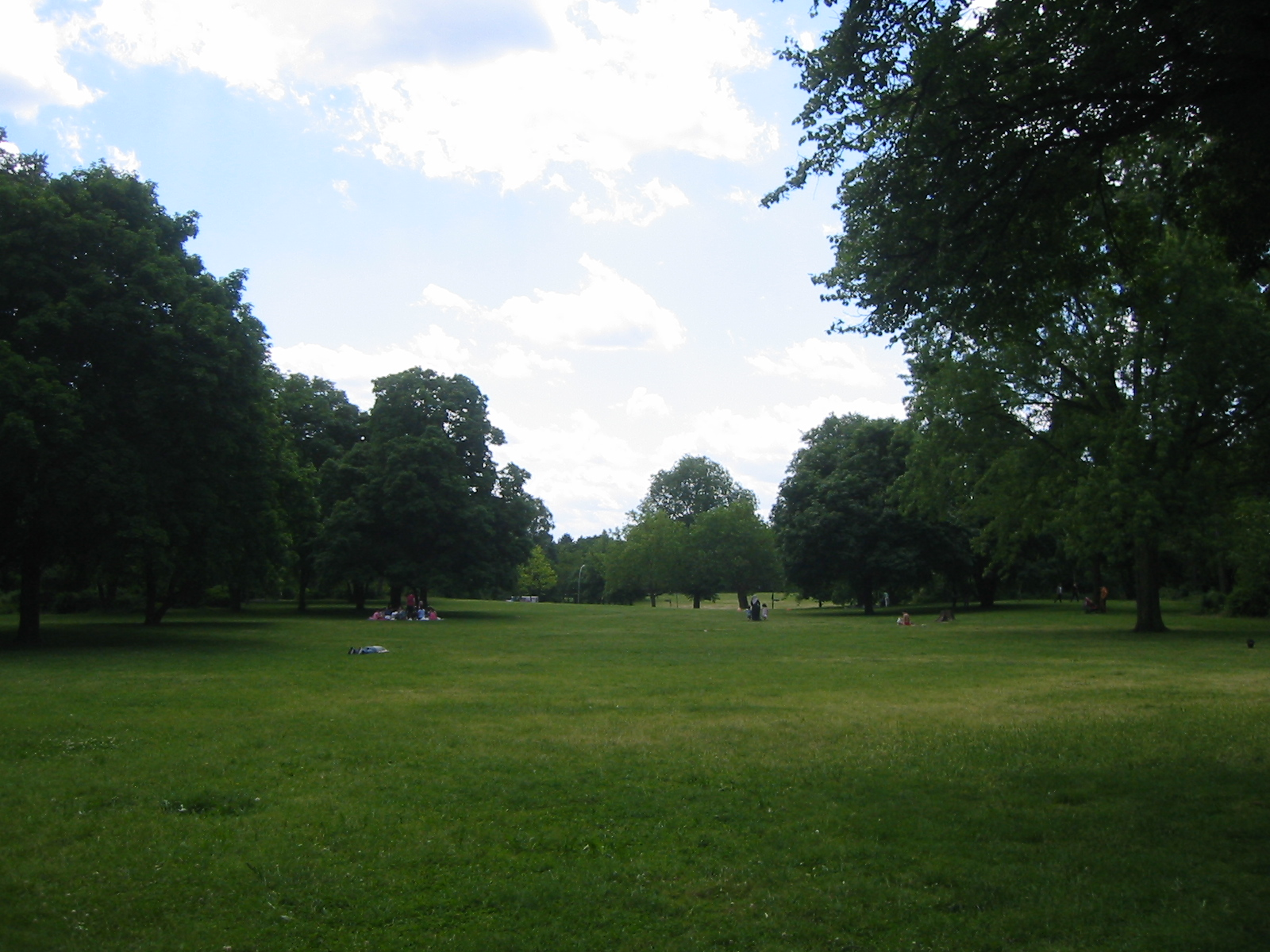 Lessinghöhe in Berlin-Neukölln; Der ehemalige Neuköllner Rollberg wurde industriell abgebaut; nach dem Zweiten Weltkrieg wurde der Platz genutzt, um Trümmer der angrenzenden Häuser aufzuschütten.